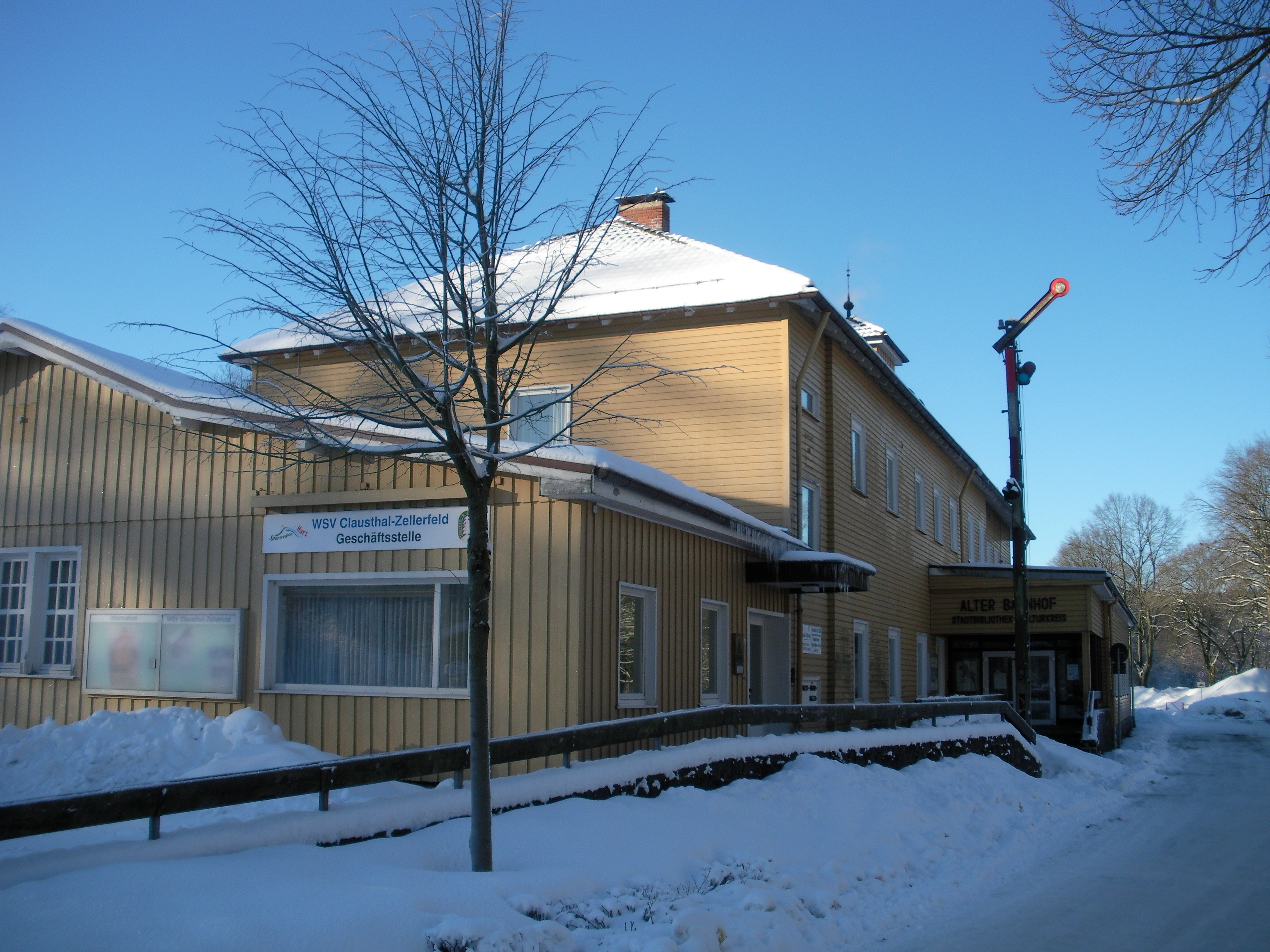 Clausthal, ehemaliger Bahnhof